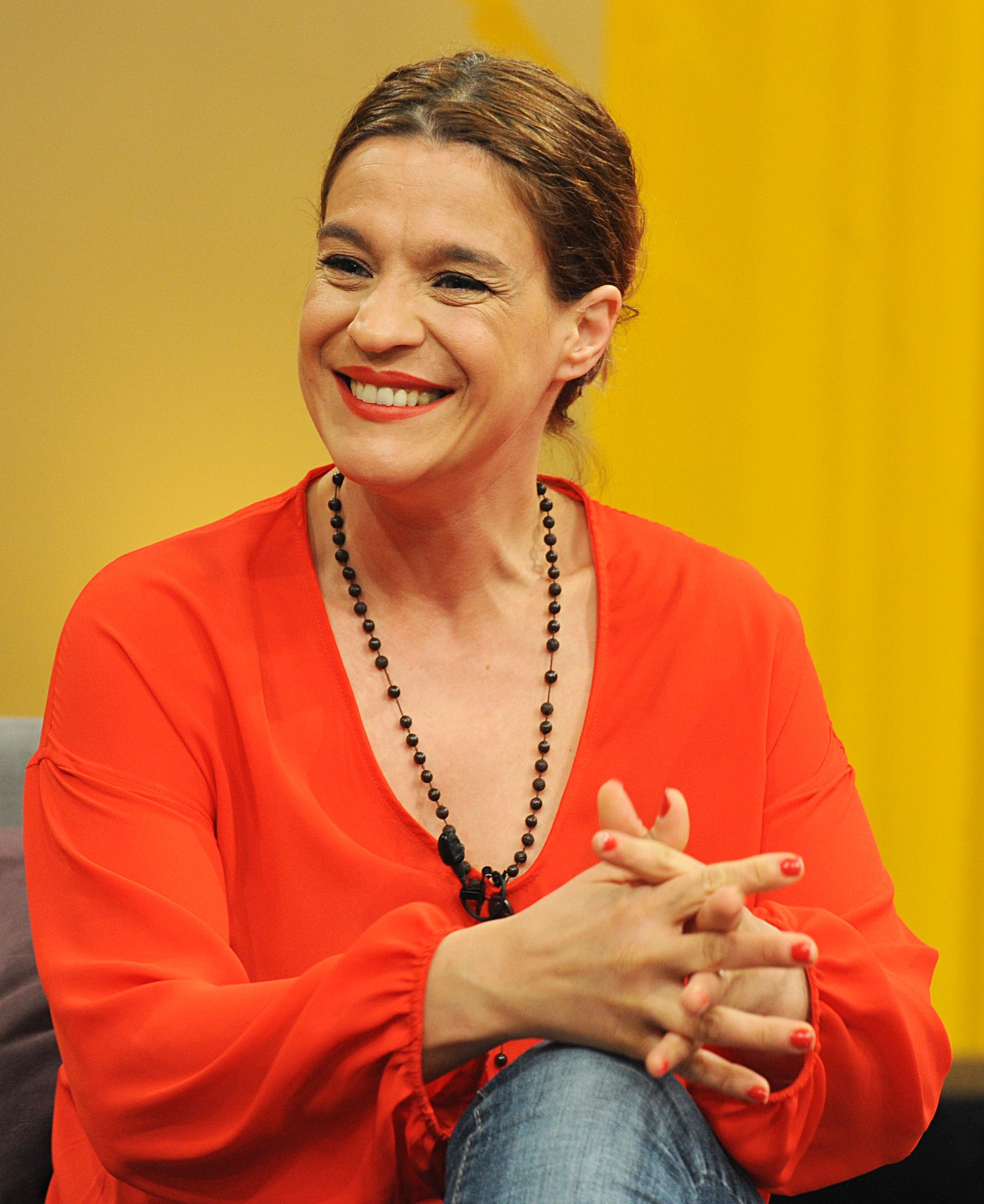 Leticia Bredice